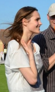 Camille Lou, au jumping internationale CSI3 de Maubeuge Photo crédit : Félineda Farfelue